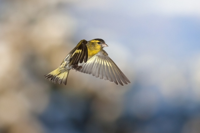 Erlenzeisig im Flug